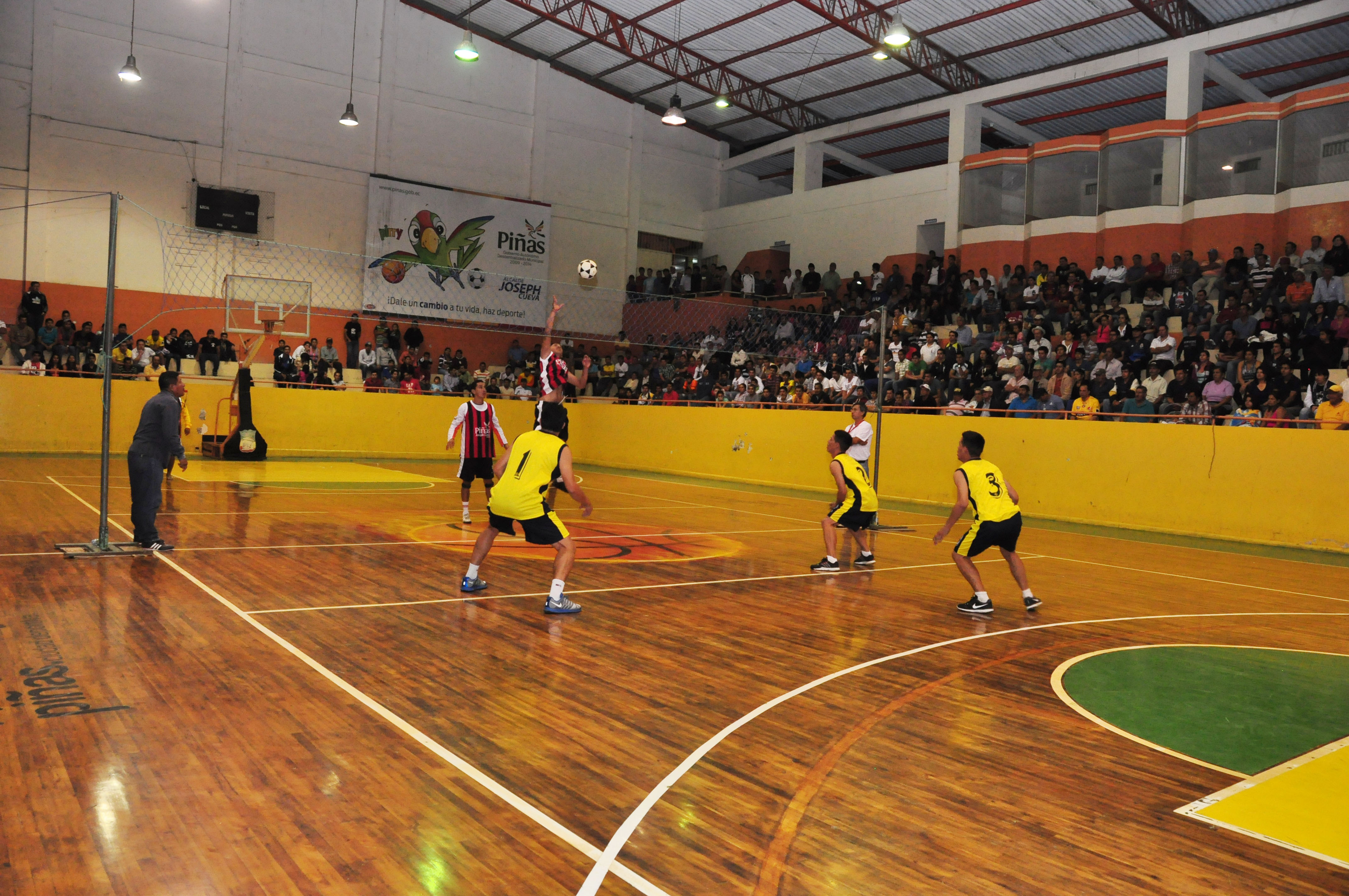 Campeonato Nacional de Ecuavoley en Piñas